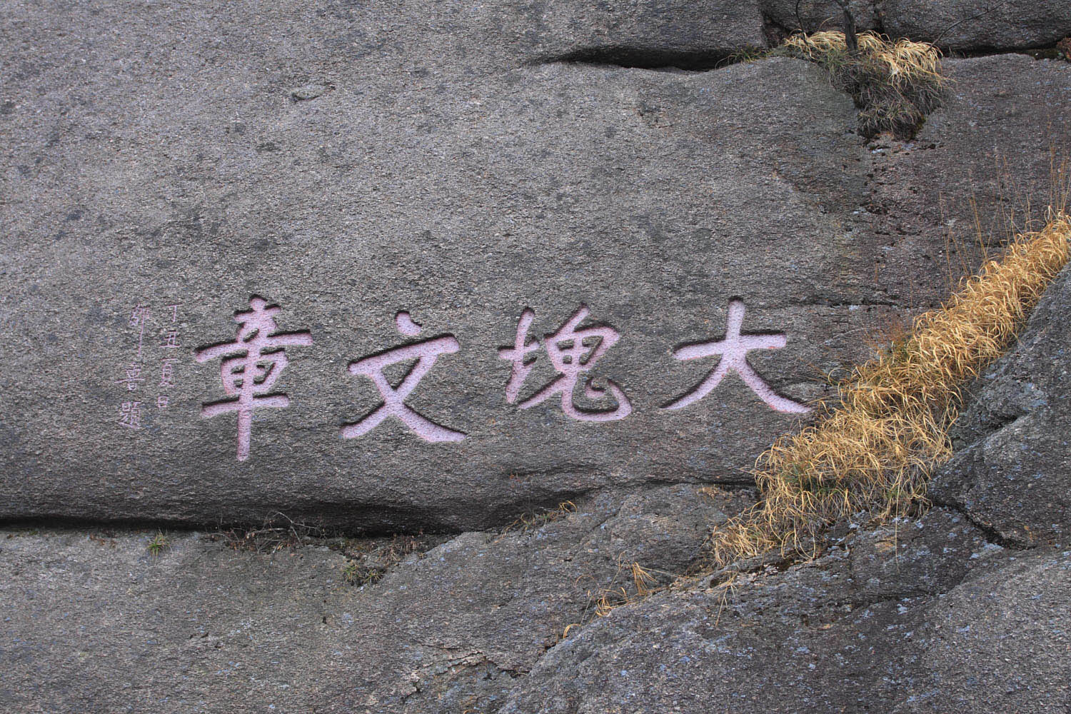 黄山摩崖石刻，安徽省文物保护单位。